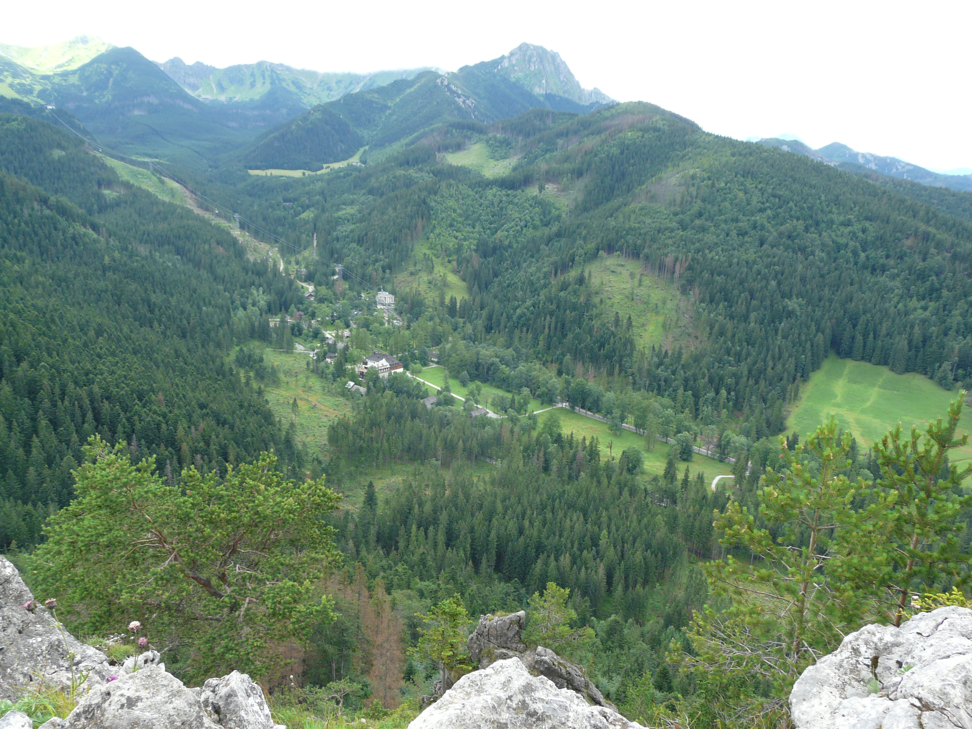 Droga na i widoki z Kużnic na Nosala, Tatry.